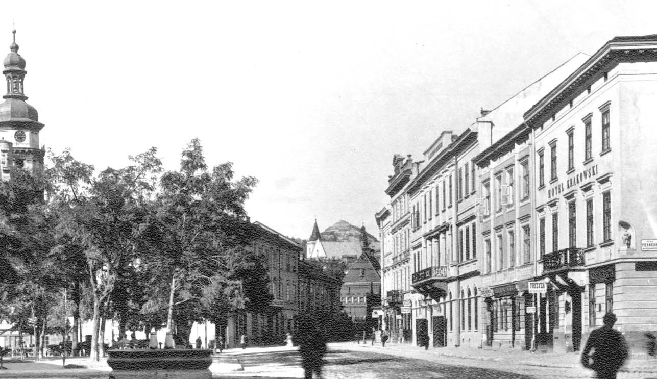 Львів, пл.Соборна